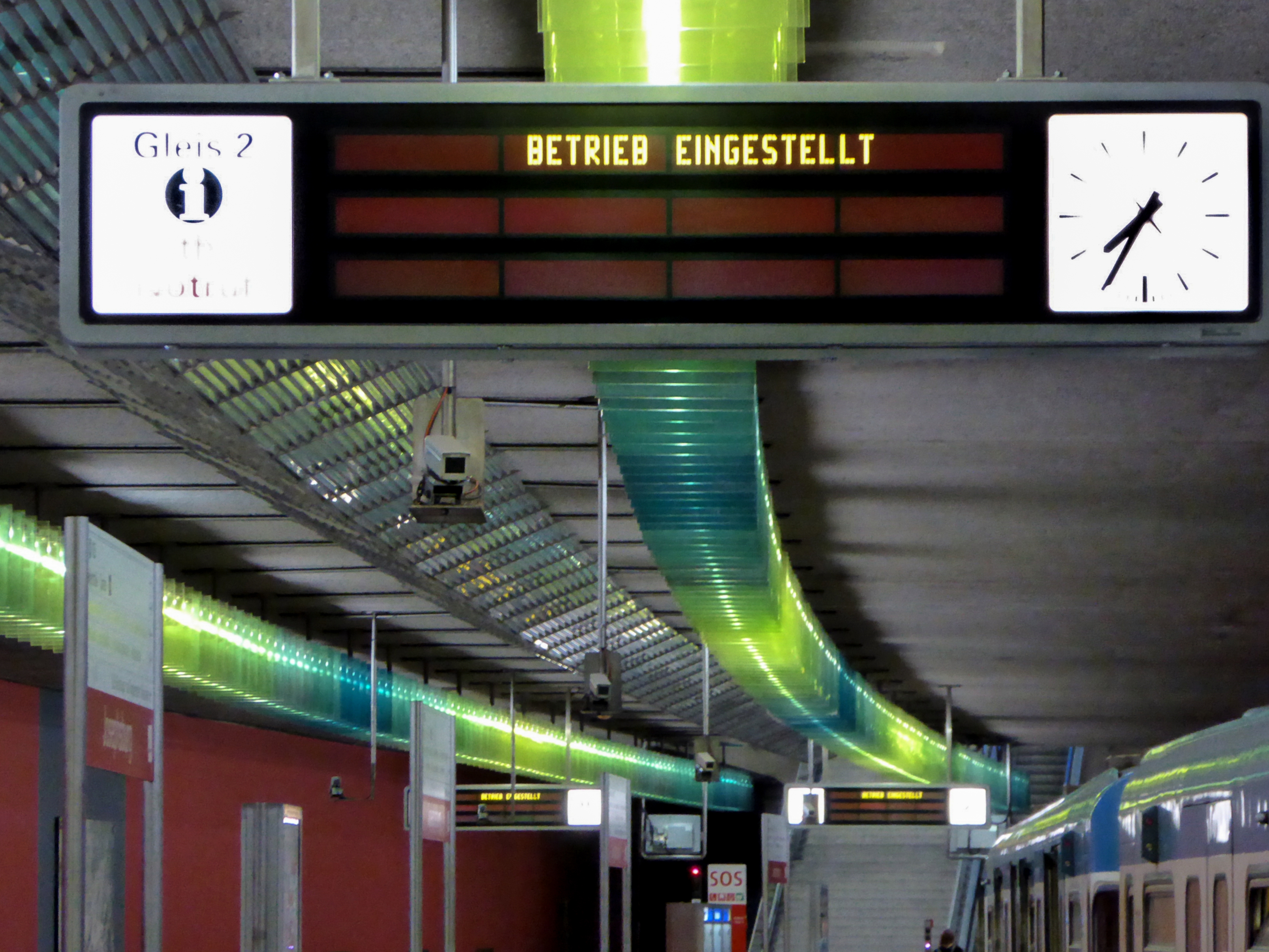 Nach tödlichen Schüssen im Olympia-Einkaufszentrum in München stellte die Münchner Verkehrsgesellschaft den Betrieb ein.